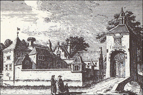 pentekening van het slot Groenesteyn